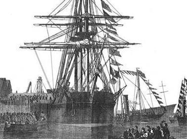 HMS Resolute